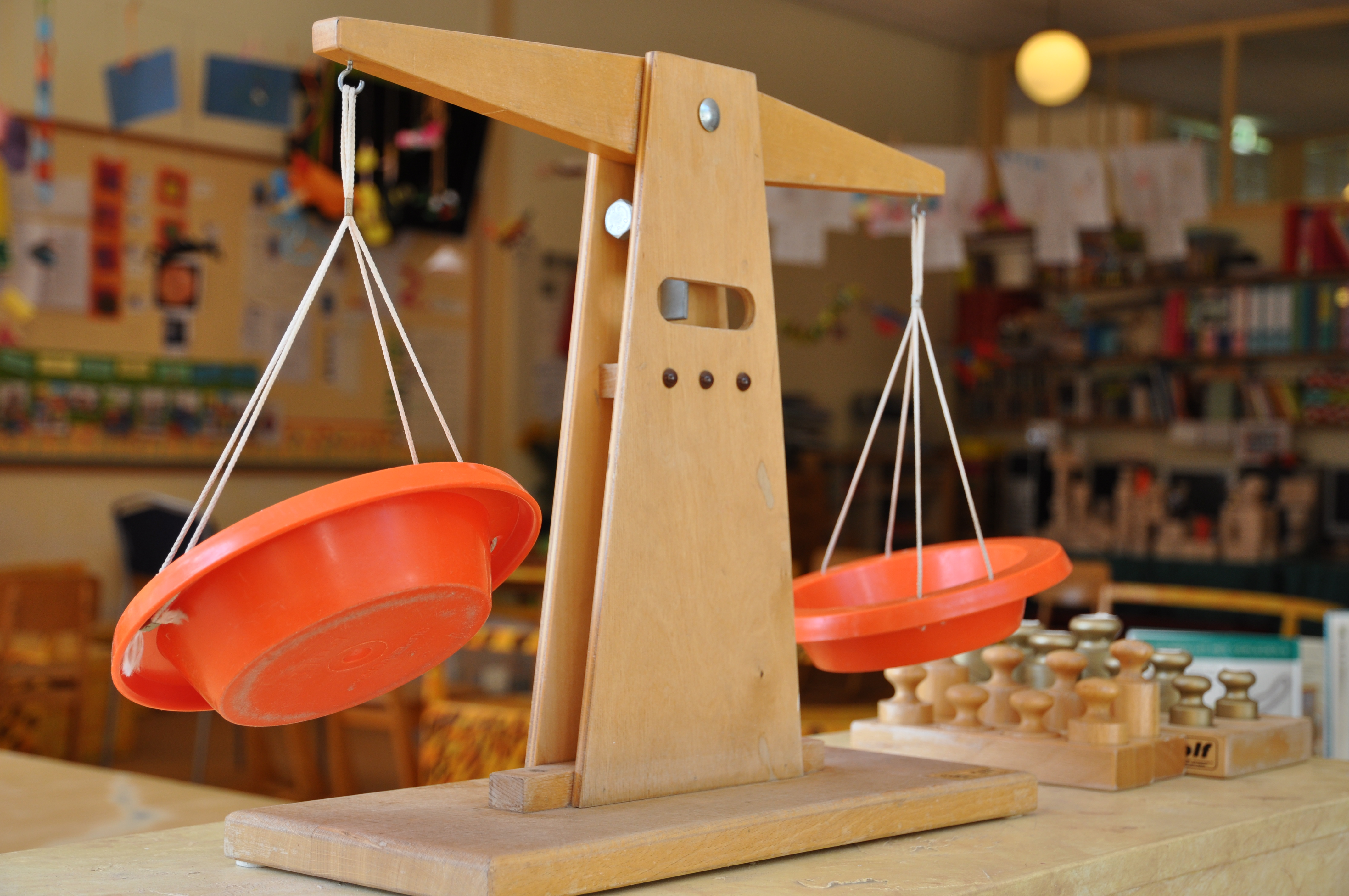 Weegschaal als didactisch middel op een basisschool.